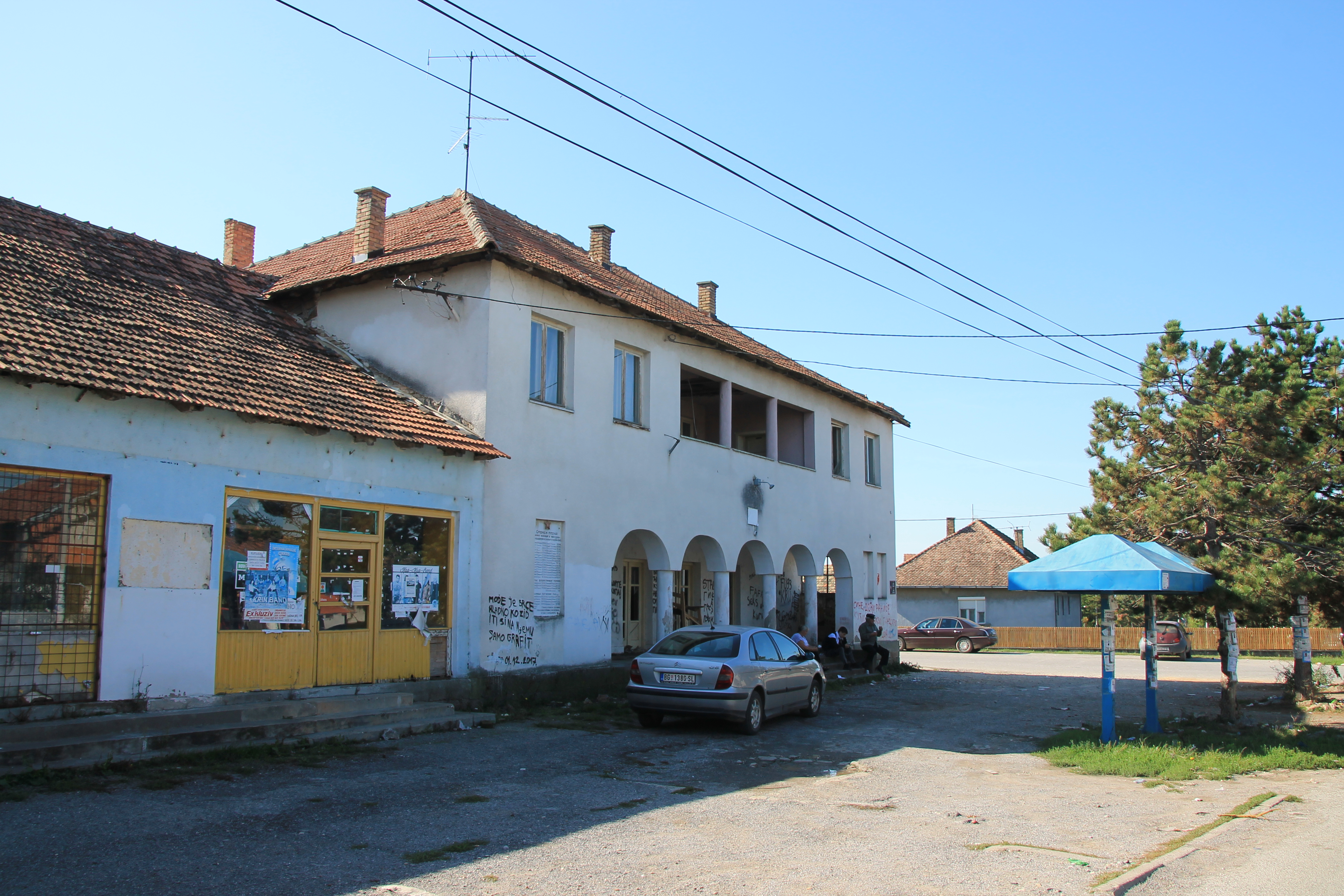 Jagnjilo (Mladenovac)